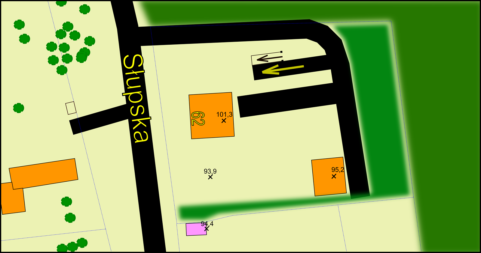 Schron prezydenta Poznania - mapa